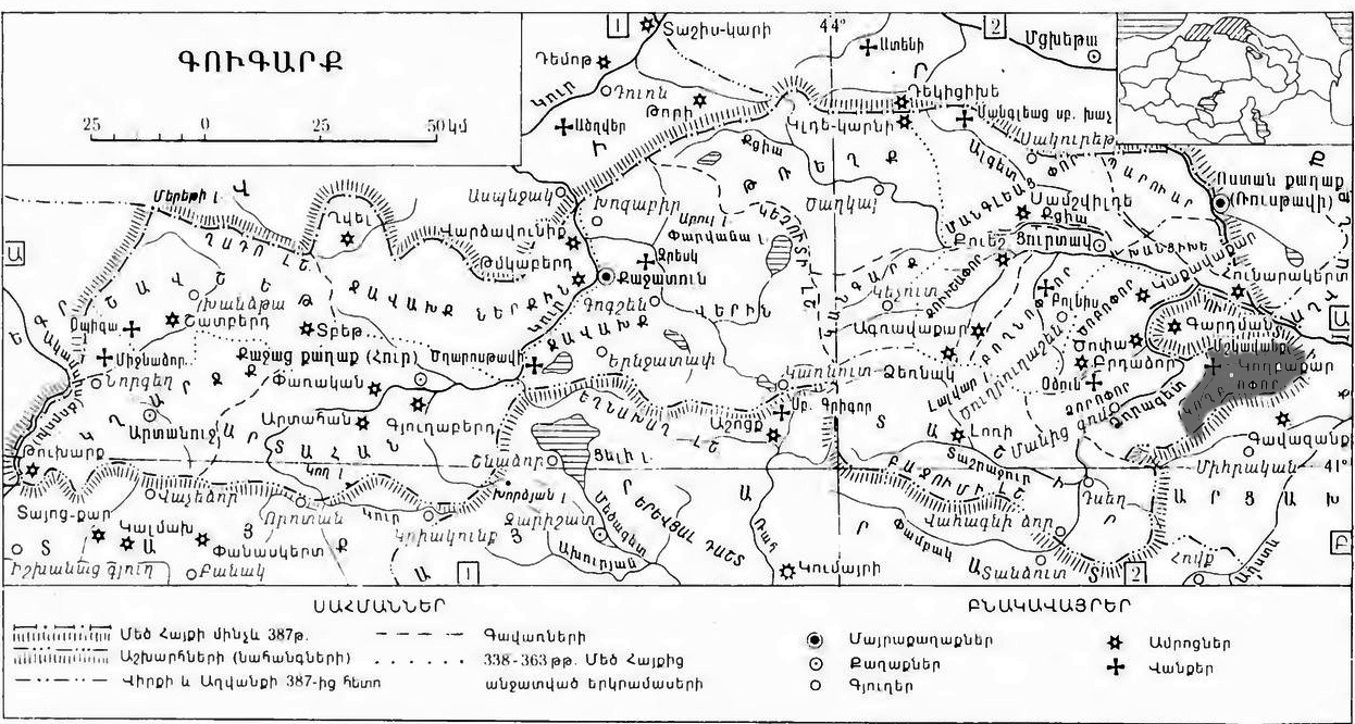 Կողբափոր Գուգարք